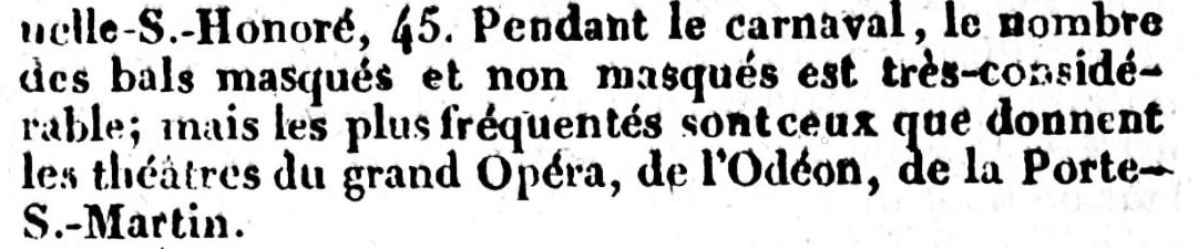 Annonce des bals du Carnaval à Paris.